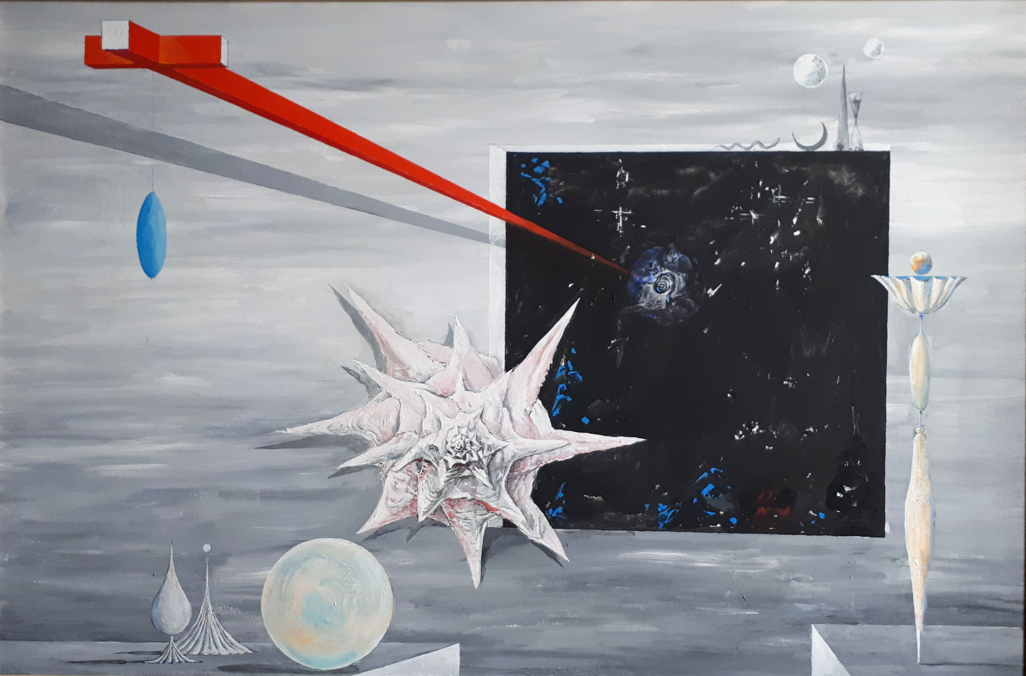 Орловский В. Ф. Увертюра к космопластицизму, 2018 г. Холст, темпера, 80х120см.